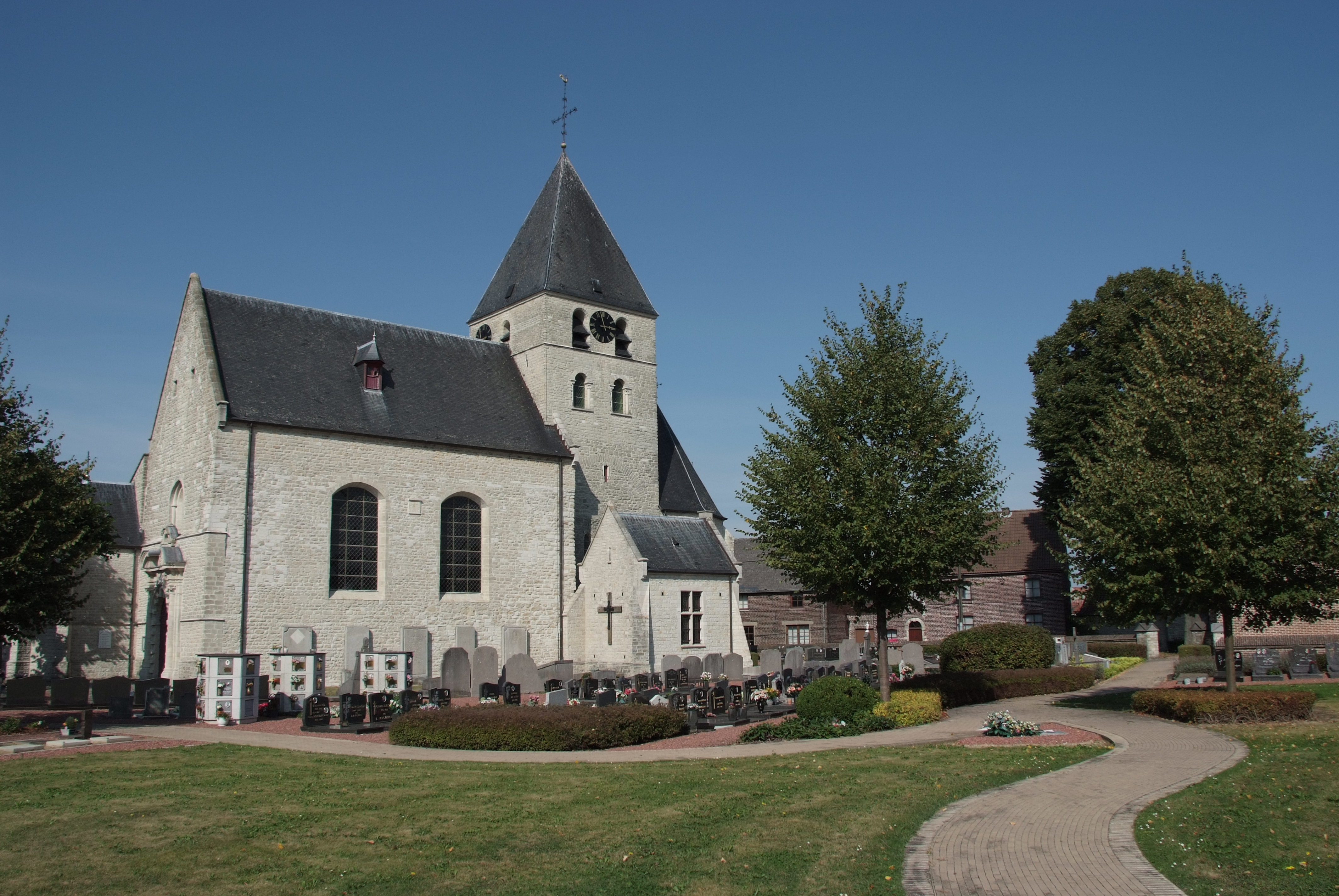 Sint-Catharinakerk,Vlaams Brabant, Steenokkerzeel (Humelgem)